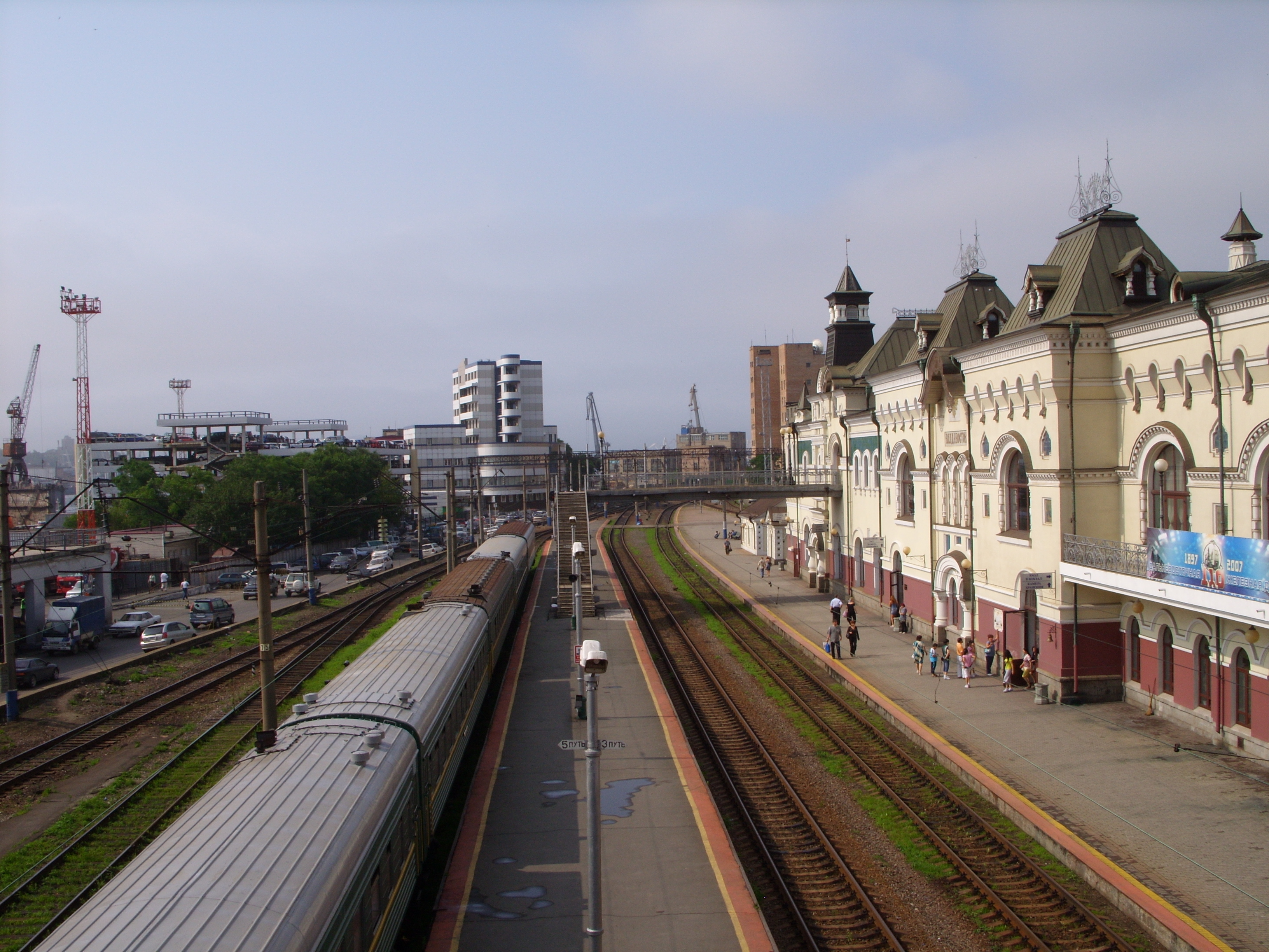 снимки августа 2007 г.